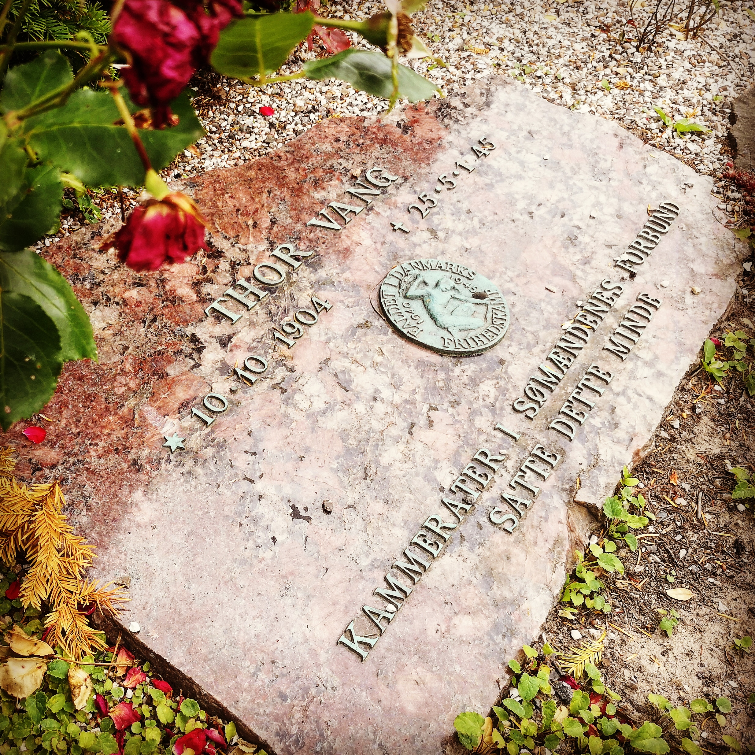 Dette er et billede af Thor Vangs gravsted på Bispebjerg kirkegård. Billedet er taget 21. juli 2019 af Thors oldebarn Janus Heiberg Madsen.